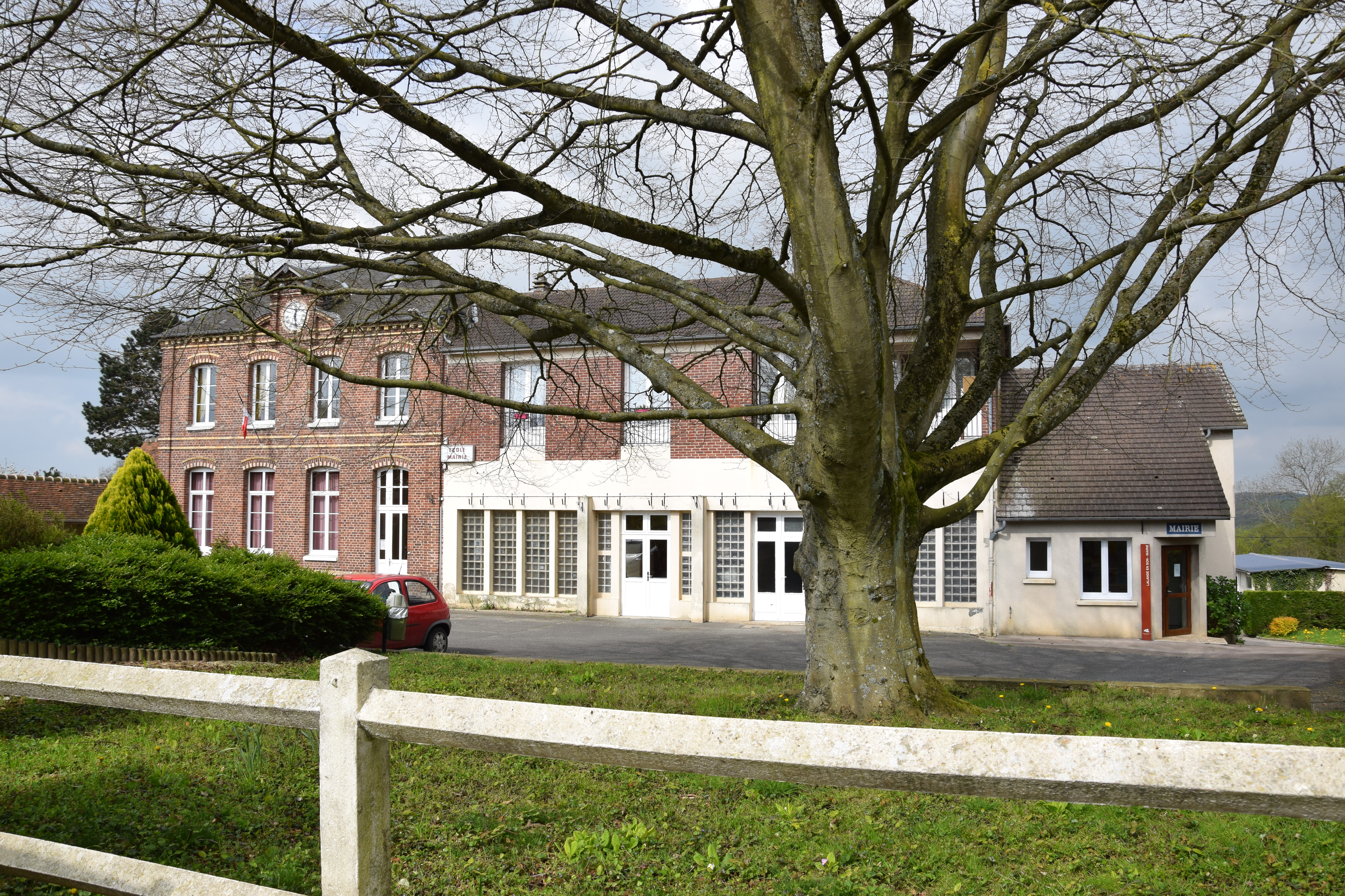 Lalande-en-Son